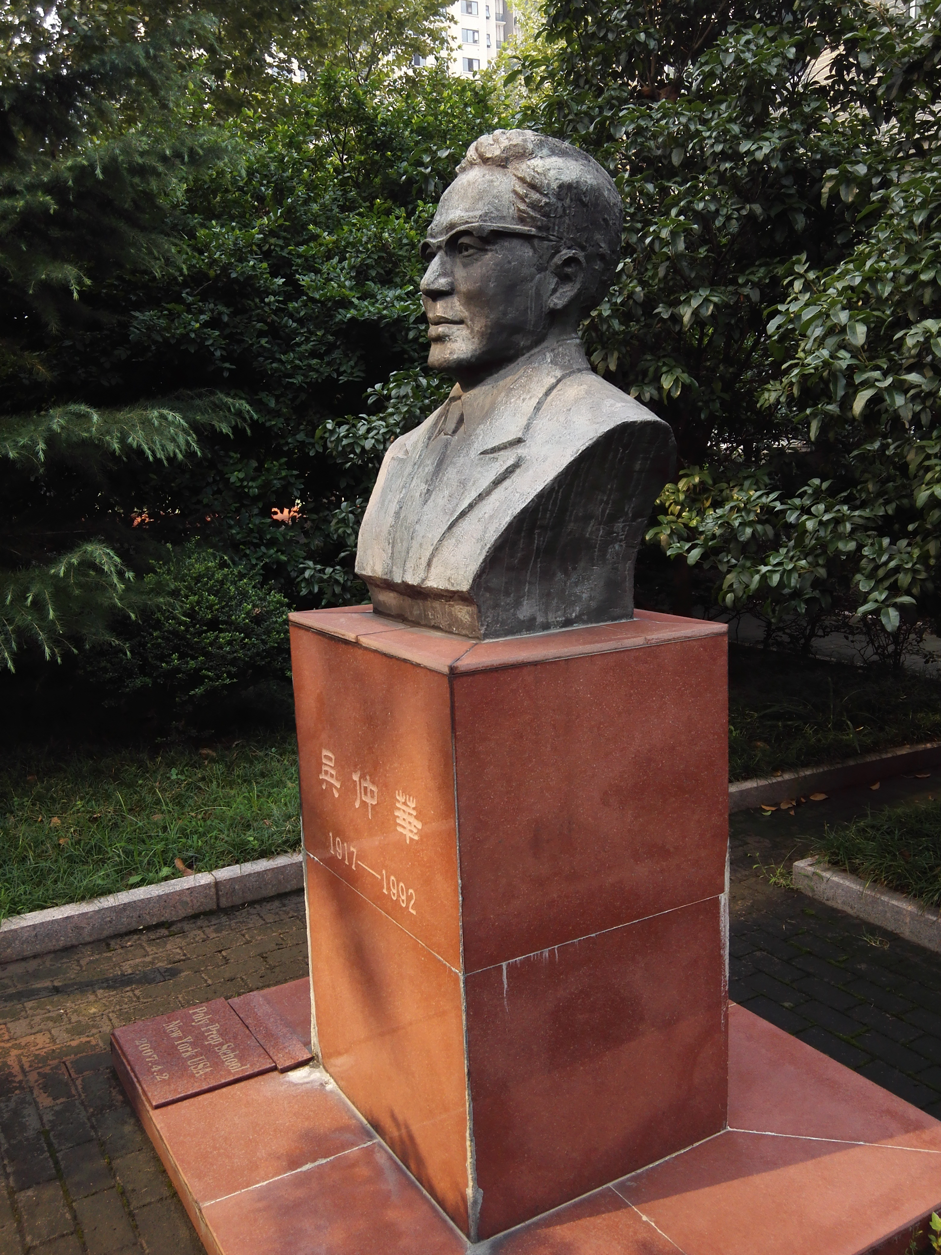 中文（中国大陆）: 吴仲华雕塑，位于南京市金陵中学校园内。